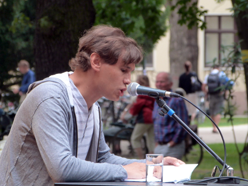 German writer Steffen Popp (* 1978) at the Erlanger Poetenfest 2013.